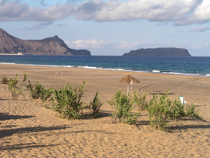 Porto Santo beach